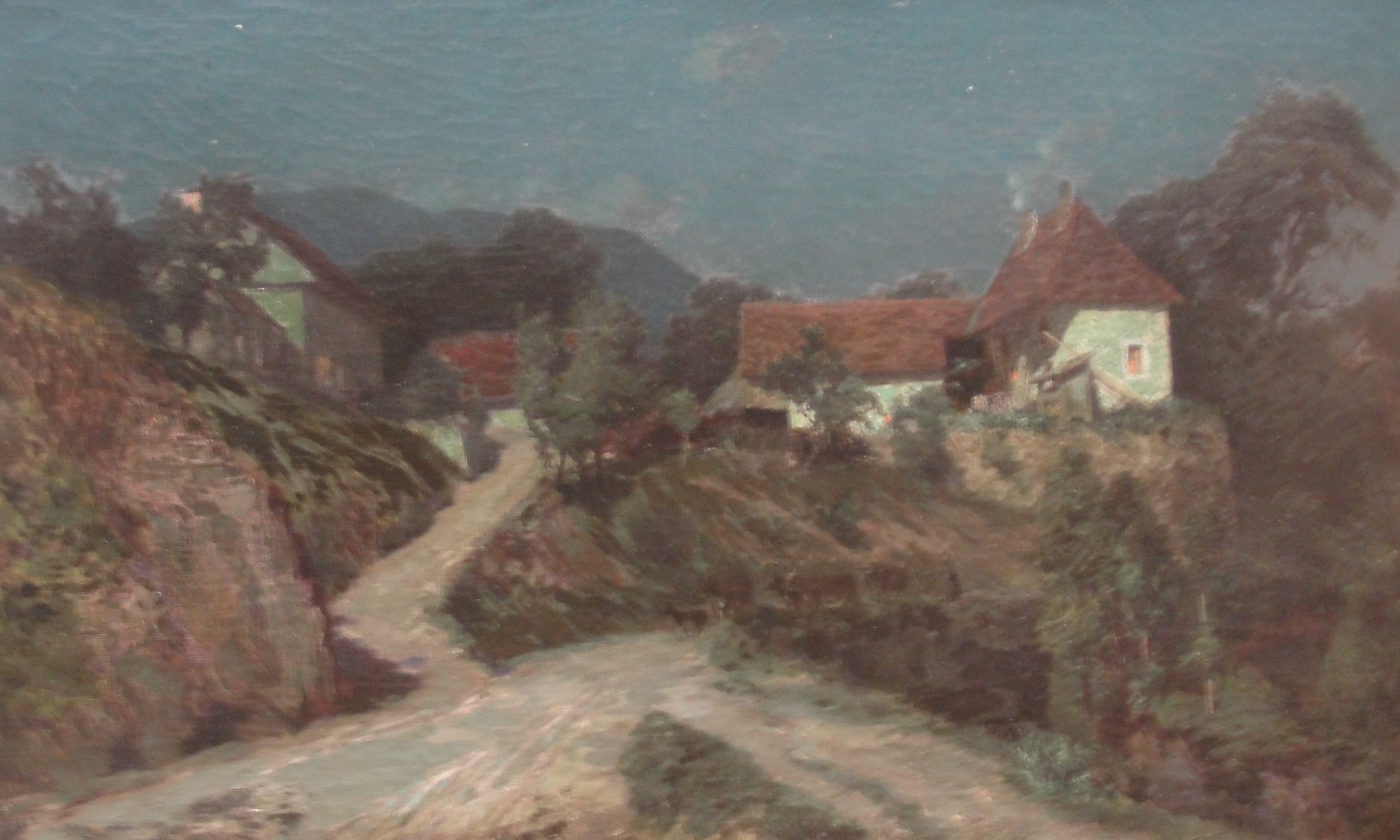 Nuit claire à Saint-Pierre-d'Entremont